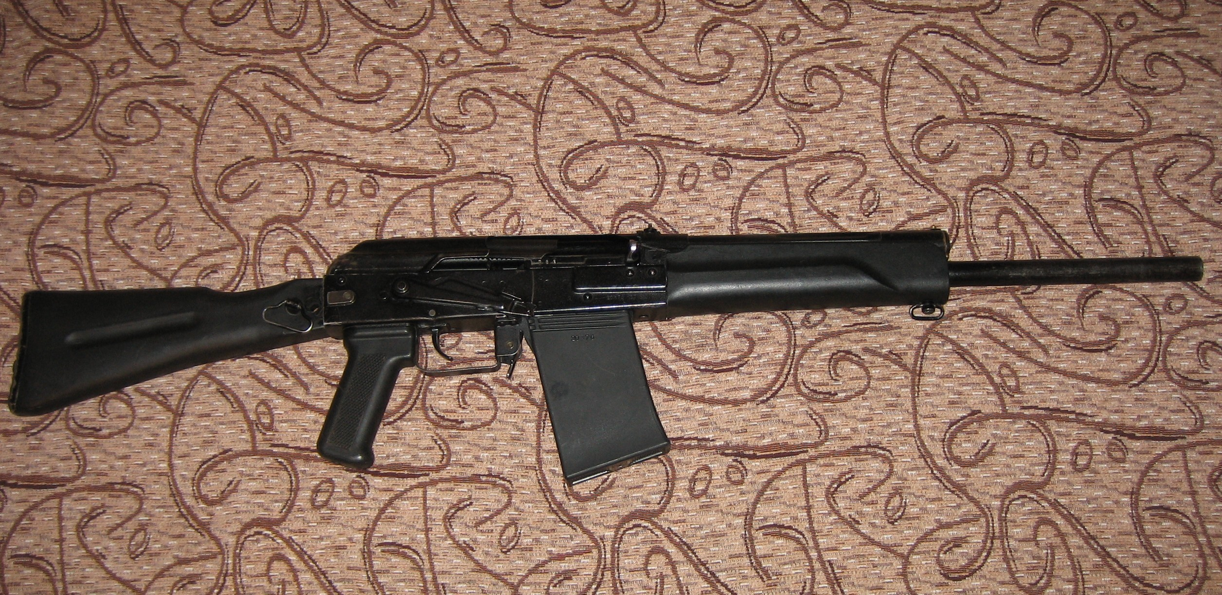 Карабин Сайга20К